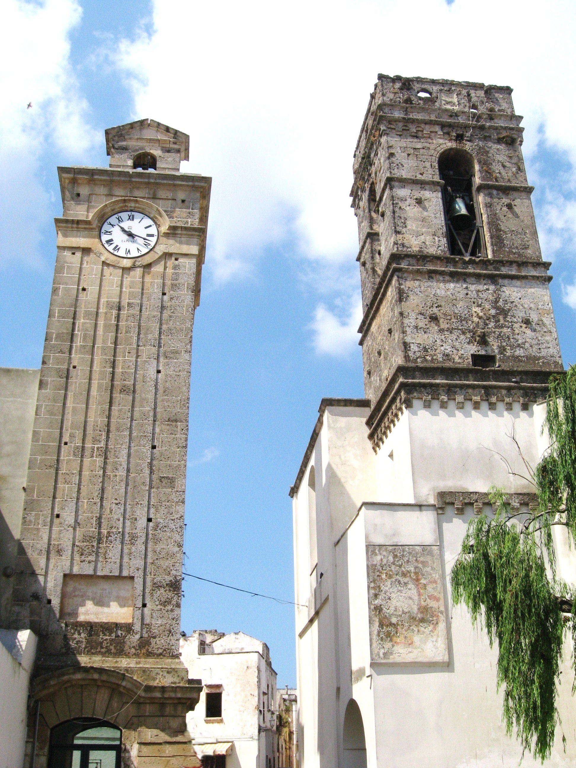 torri porta di ingresso